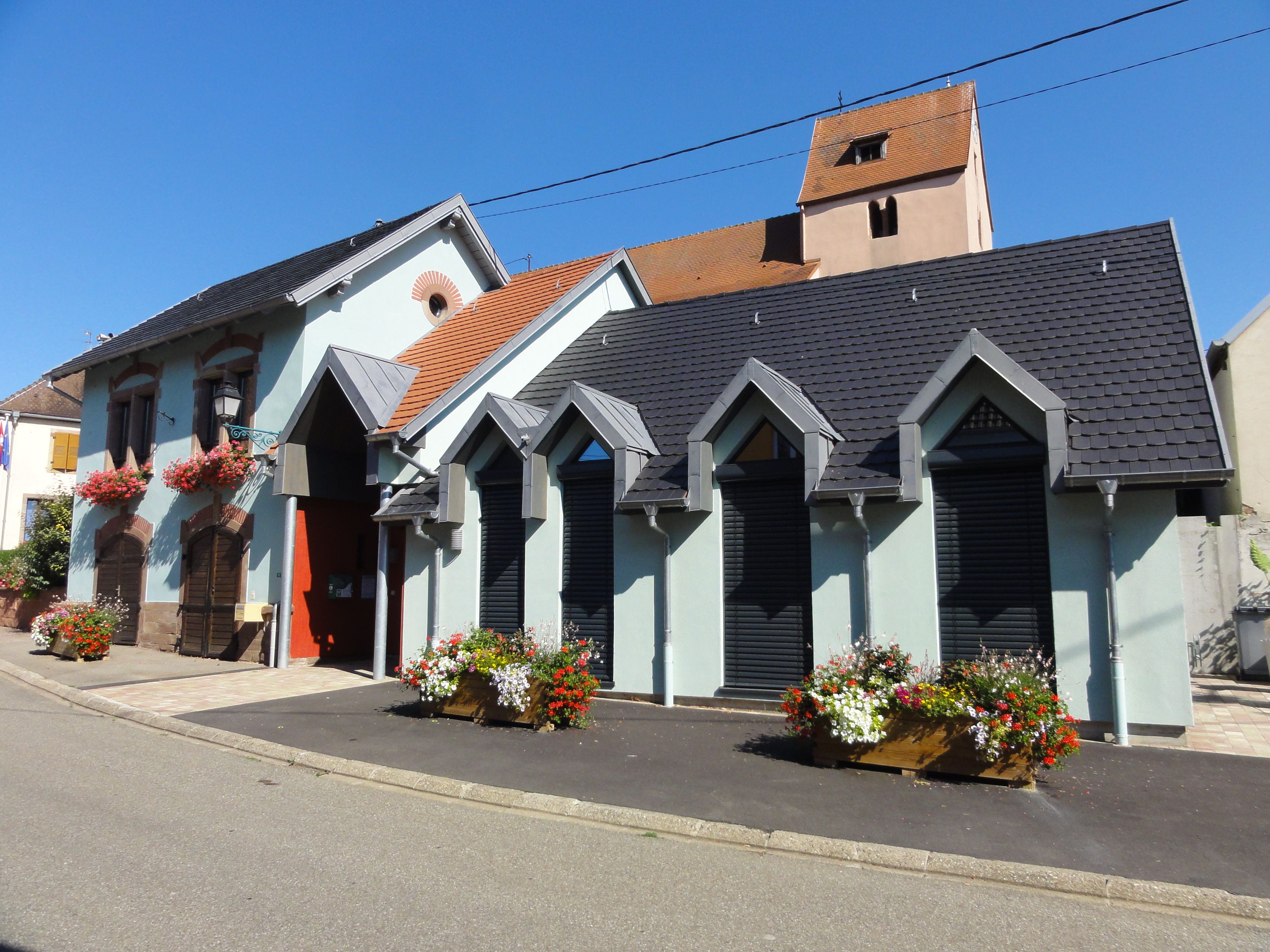 Alsace, Bas-Rhin, Littenheim, Mairie, rue Principale.